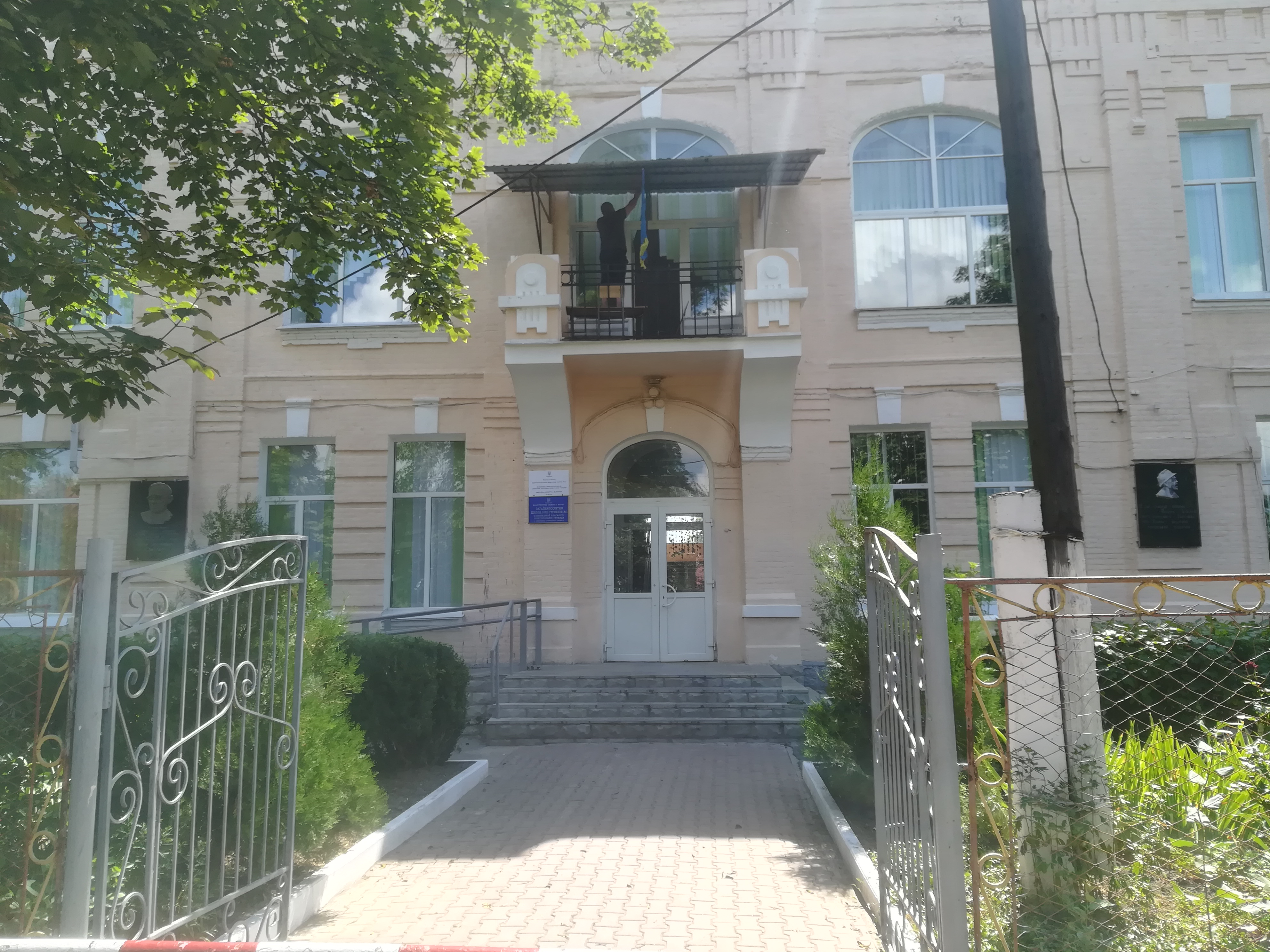 Загальноосвітня школа №1 у Жмеринці після виконання робіт по утепленню